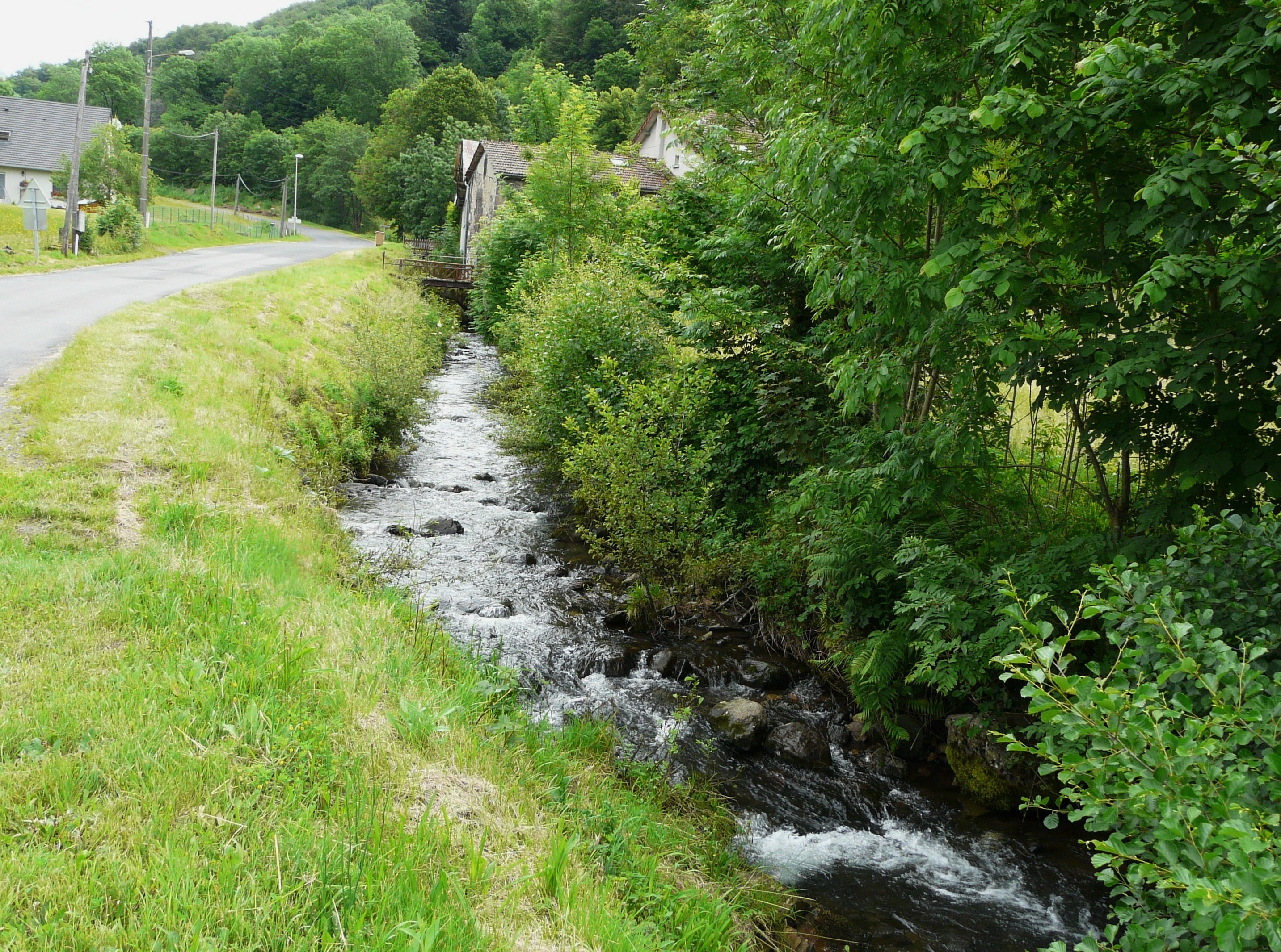 L'Authre à Vercuères, Laroquevieille, Cantal, France. Vue prise en direction de l'amont.